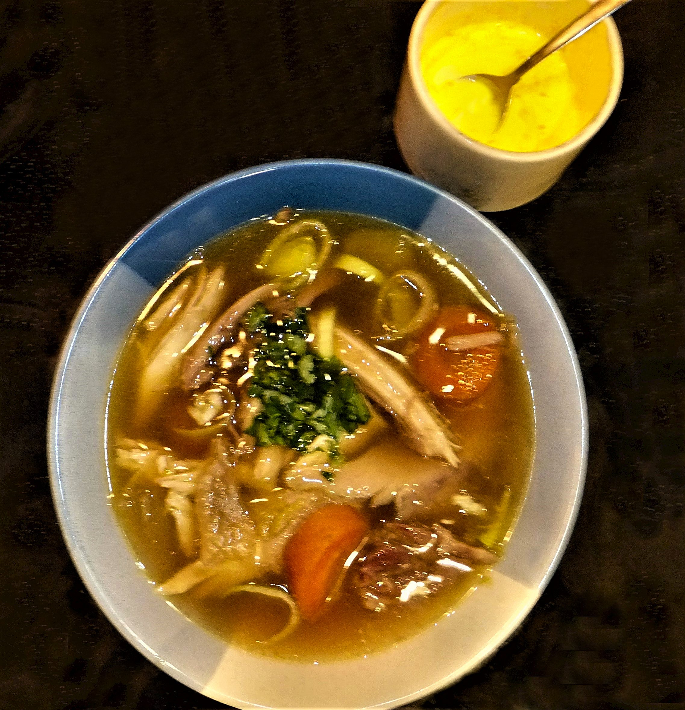 Ciorba de pui - Säuerliche Hühnersuppe